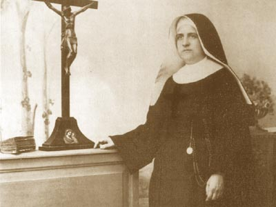 Madre Giuseppina Vannini